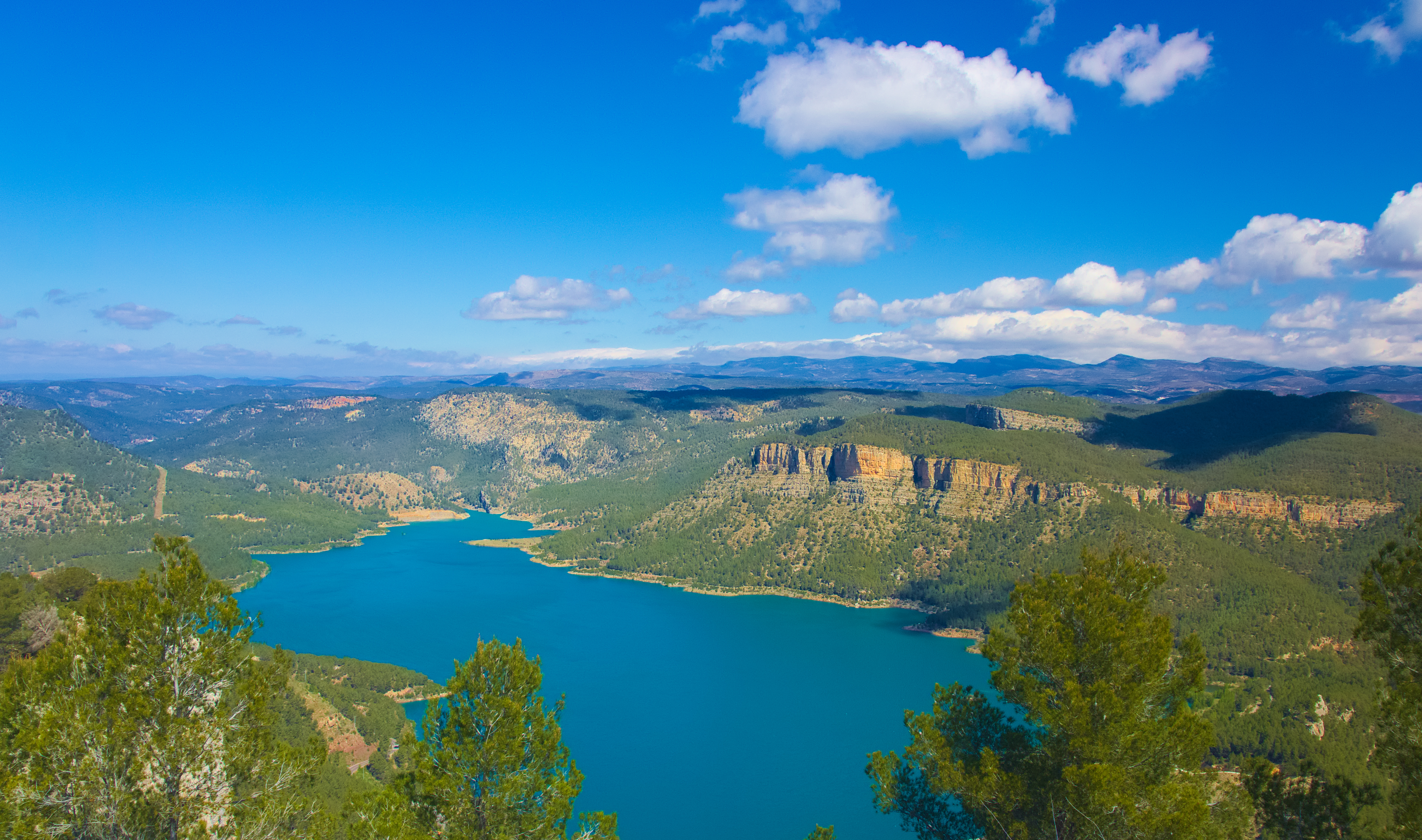 Curso alto del río Mijares This is a photography of a Site of Community Importance in Spain with the ID: ES5222004. Natura2000 entry, EEA entry